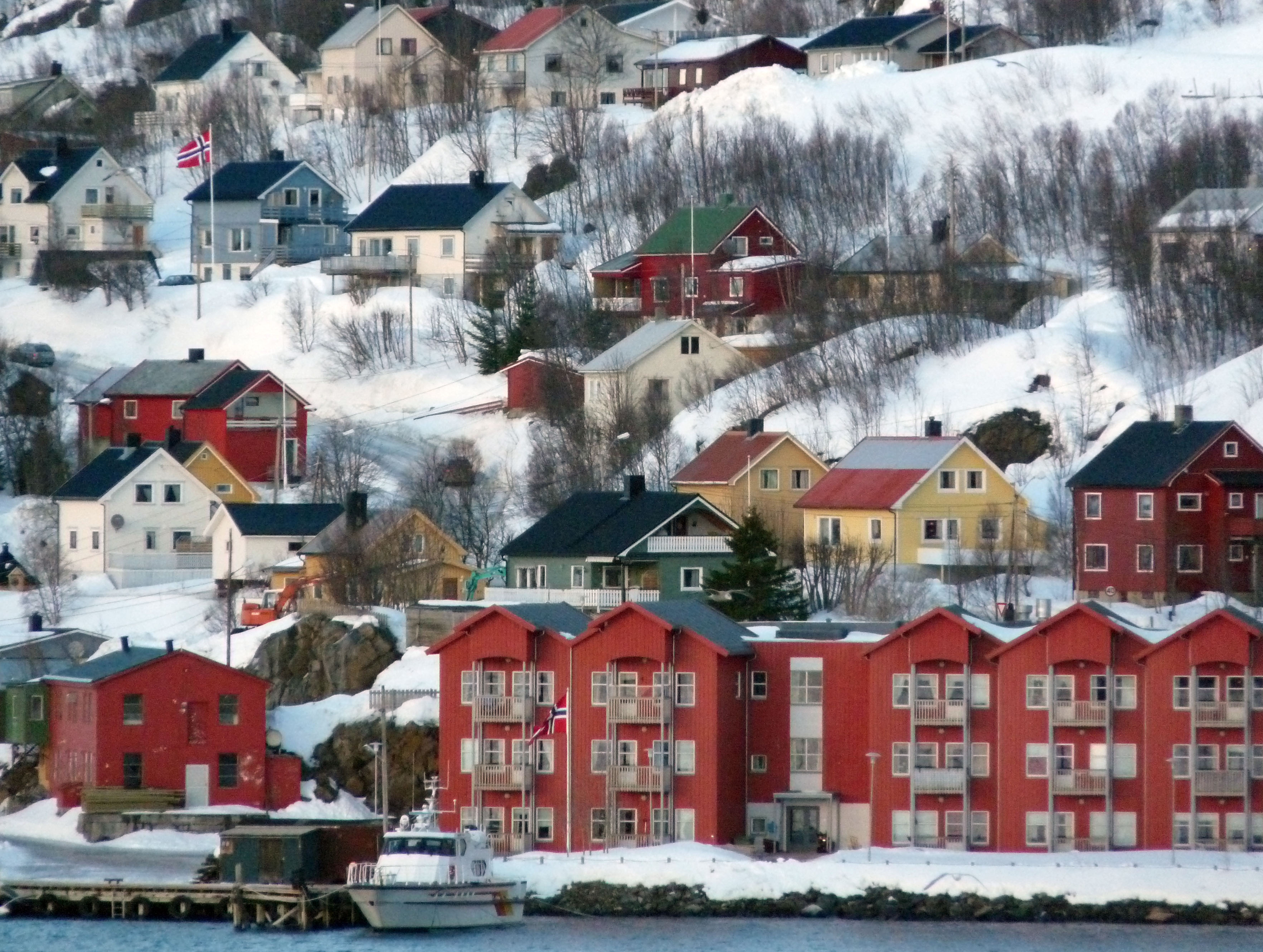 23 Øksfjord